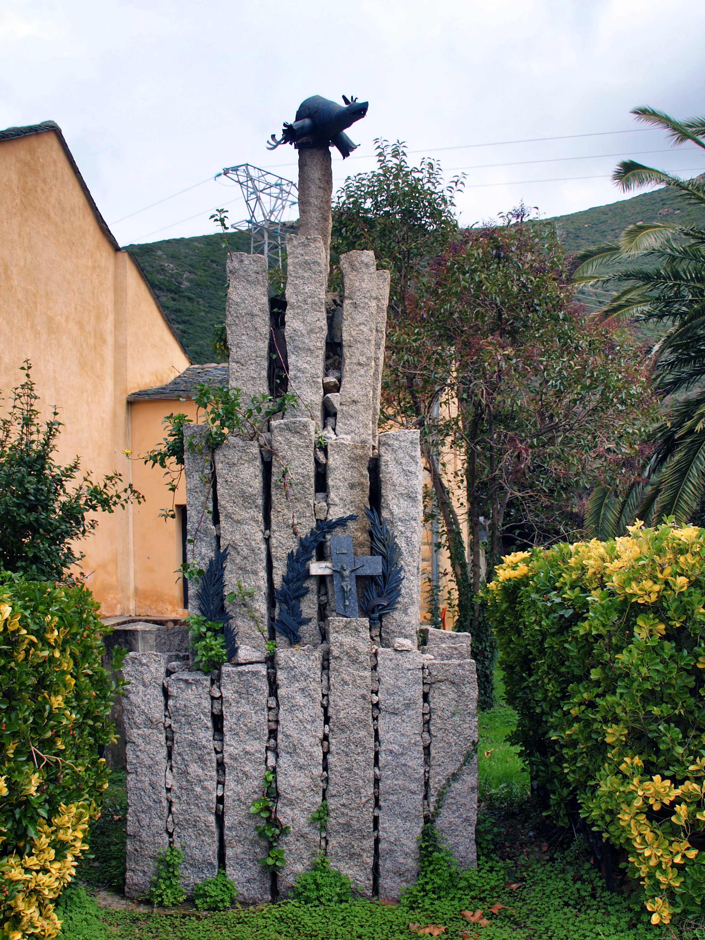 Olmeta-di-Tuda, Nebbio (Corse) - Mémorial Jean Casale, aviateur originaire du village